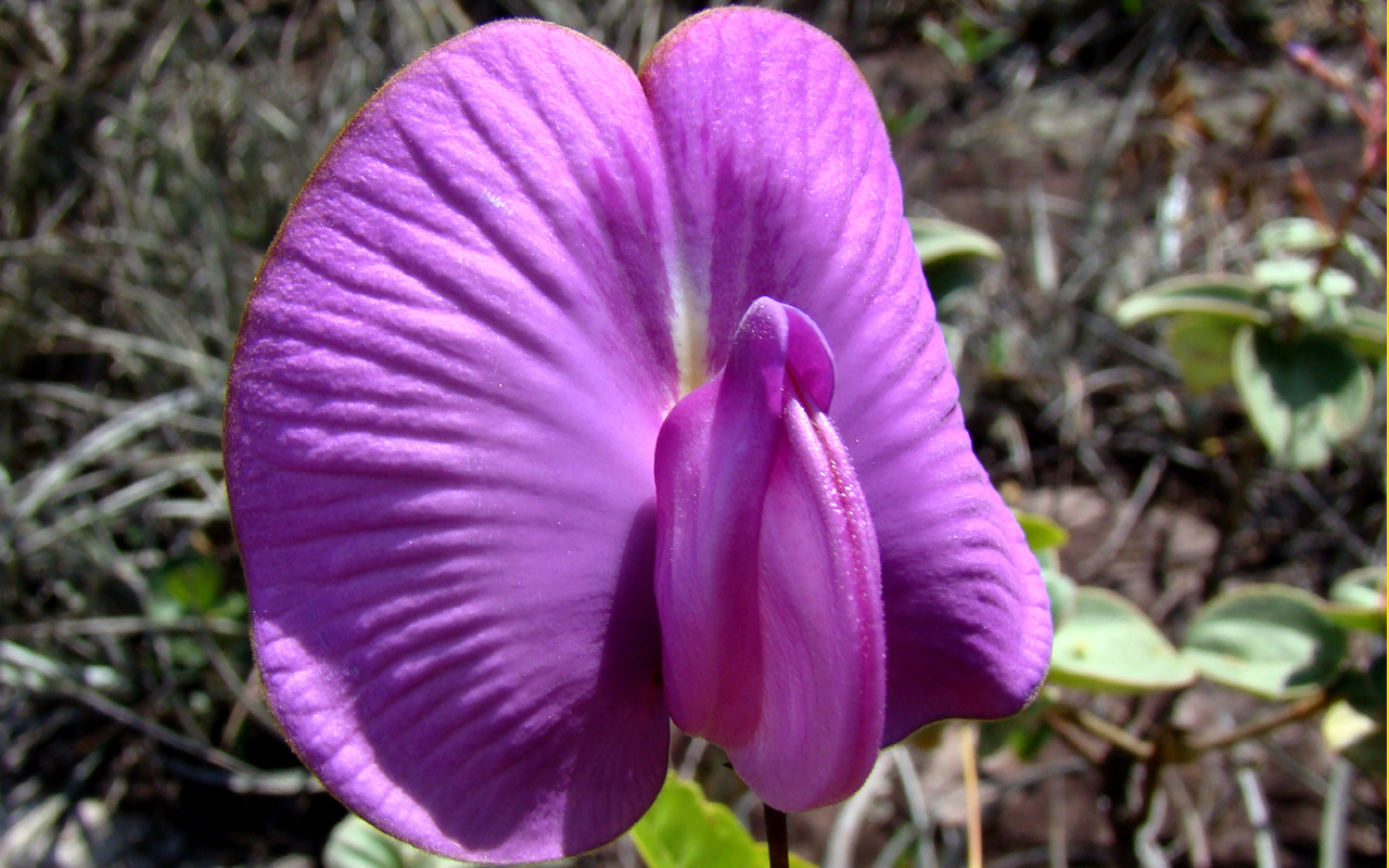 Centrosema coriaceum